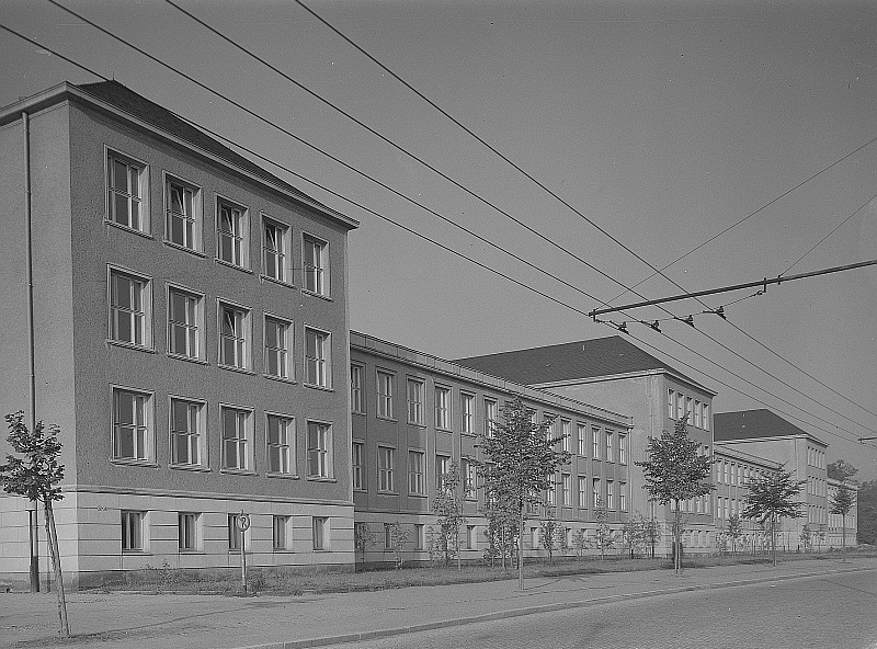 Original image description from the Deutsche FotothekDresden. Technische Universität, Willers-Bau Oberleitungen der Dresdner O-Bus-Linie C am Zelleschen Weg